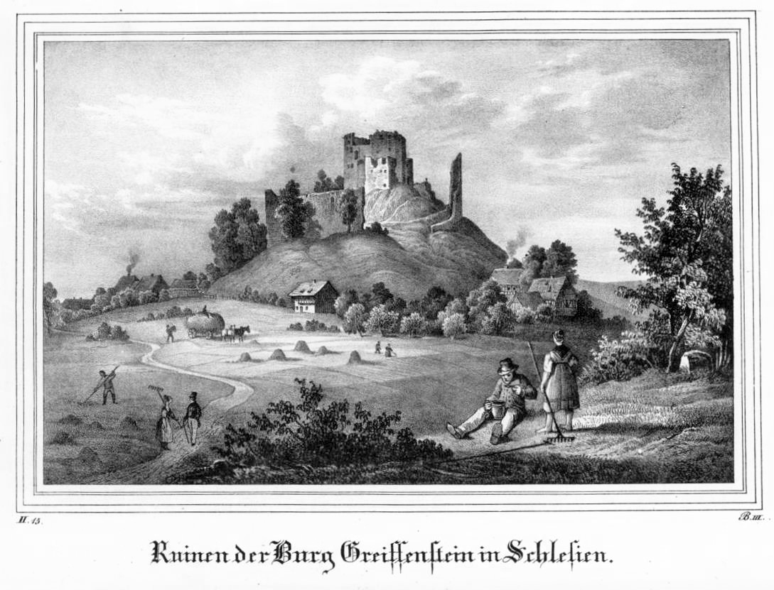 Ansicht Burgruine Greiffenstein in Schlesien. Lithographie von Teichgräber